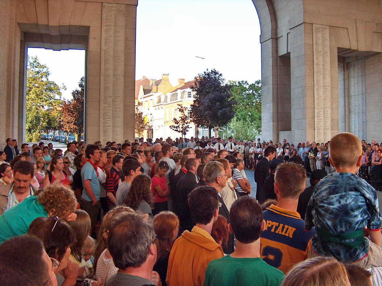 Publiek domein, en uitdrukkelijke toestemming voor gebruik op Wikipedia. bezoekers in de Menenpoort tijdens de Last post. foto gemaakt door mij, Gvandenbor, juli 2005.